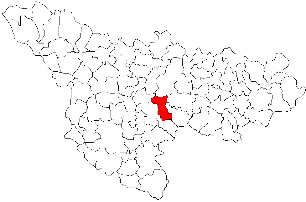 Cheveresu Mare, Timis Licensing Categorie:Hărţi ale judeţului Timiş